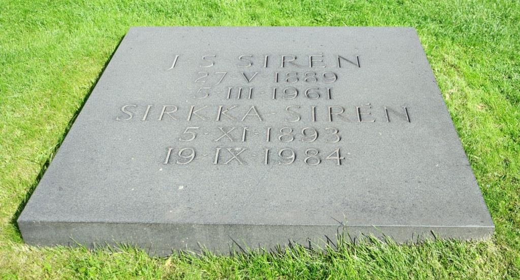 Grab des finnischen Architekten Johan Sigfrid Sirén (1889-1961) auf dem Friedhof Hietaniemi in Helsinki